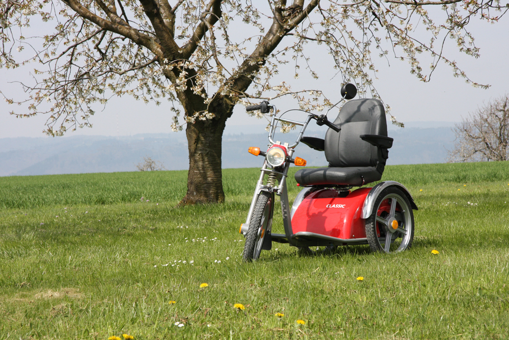 Elektromobil Classic vor blühenden Kirschbäumen in Lupfig/AG